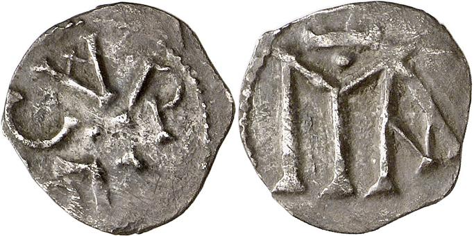 Denier au nom de Charles, attribuable à Marseille (Bouches-du-Rhône). Avers : Légende centripète, en réalité en deux parties ou deux sens : CAR/ILo autour d’un point. Revers : Monogramme composé des lettres M et A sous un globule et un tilde. S’il existe une troisième lettre au monogramme, nous pourrions lire un S, mais absolument pas un R. Le style est celui du dernier monnayage mérovingien, avec des flans légèrement plus larges. Voir les deniers lus RACIO : Belfort, n°2986, 3708, 4032, 4587/4588 qui présentent un avers proche. Les deniers carolingiens de Pépin et à plus forte raison de ceux de ses fils Carloman et Charles sont différents, de flan encore plus large. Le monnayage de Carloman est tout à fait différent : il présente un monogramme très précis, composé des lettres CARLM. La lecture est aisée et en deux parties : CAR et ILO. Nous proposons une attribution à Charles Martel, le seul Charles dont on soit déjà certain de l’existence d’un monnayage provençal, connu par le trésor de Nice-Cimiez qui contenait sept exemplaires de flan plus étroit, entrés au Cabinet des Médailles de la BnF : Prou, Mérovingiens, n°119 à 121.